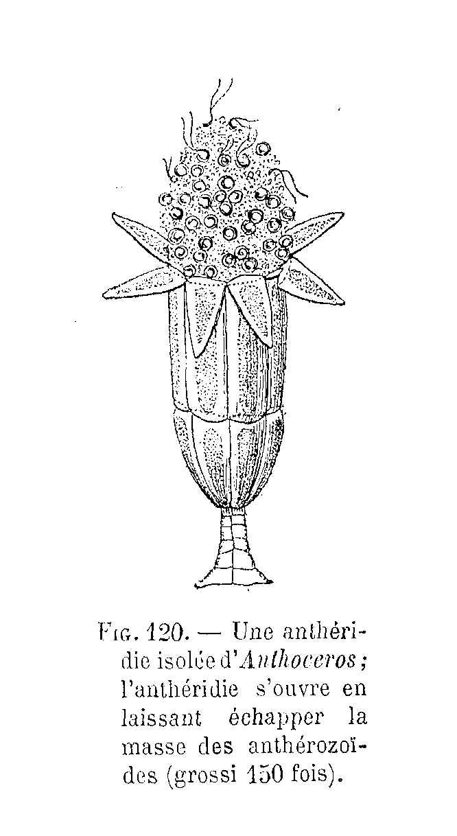 Anthoceros - anthéridie